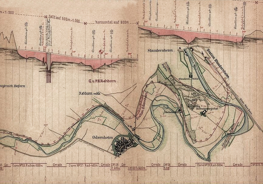 Geplanter Verlauf des Bahnhof Odernhiem und der Glantalbahn in diesem Bereich gegen Ende des 19. Jahrhunderts